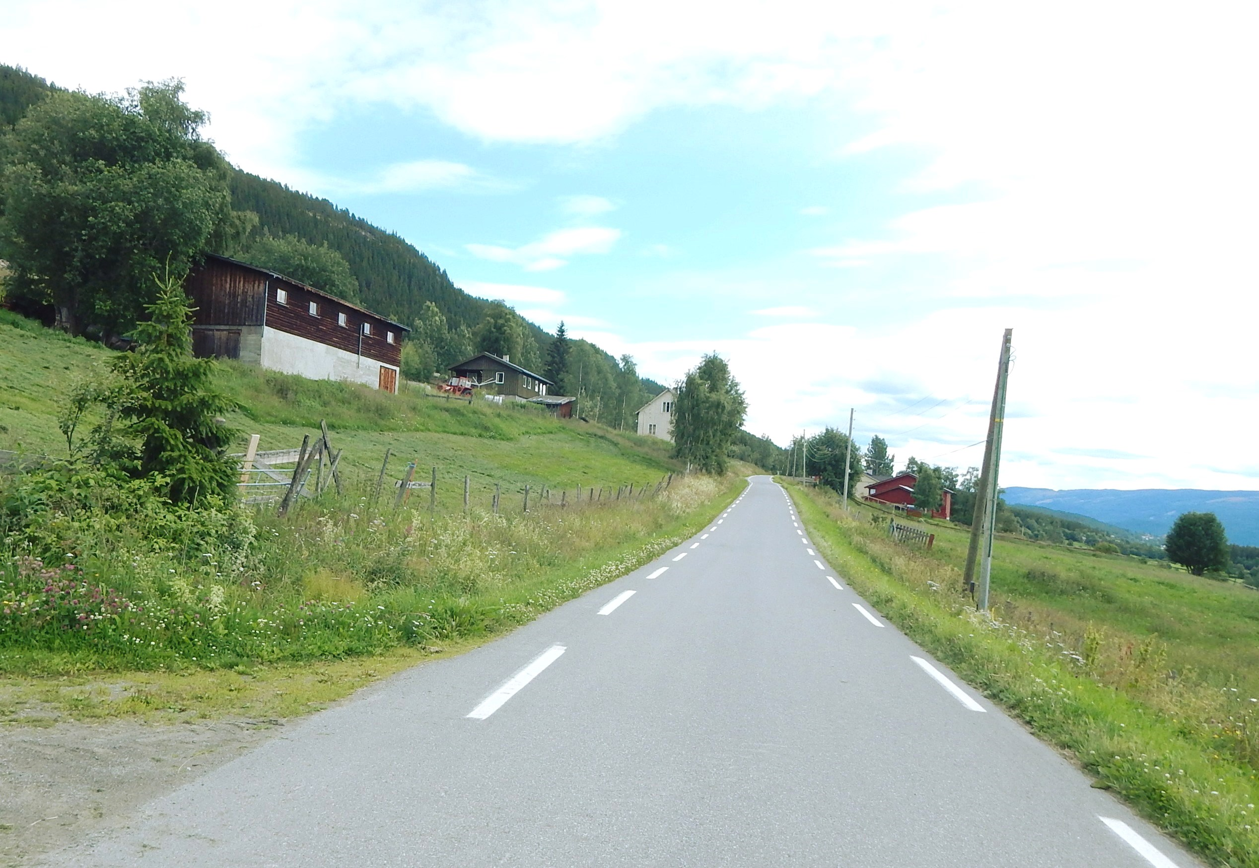 Øvrebygdvegen i Øystre Slidre